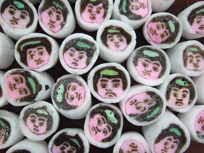 Kintaro-ame